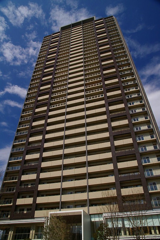 Fukushima Gardens Tower Apartment, Fukushimaku, Osaka City, Japan.